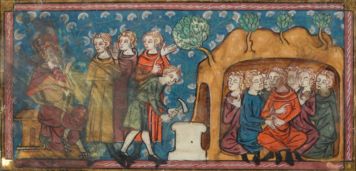 BNF MS français 185 f. 234v: Seven sleepers